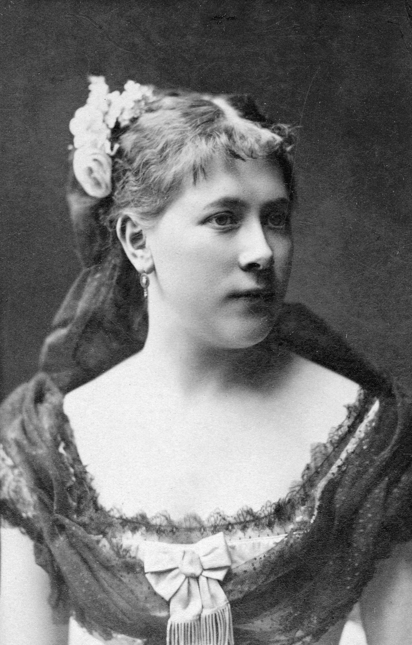 Gunhild Rosén, dansare vid Kungliga teatern (Operan) 1875